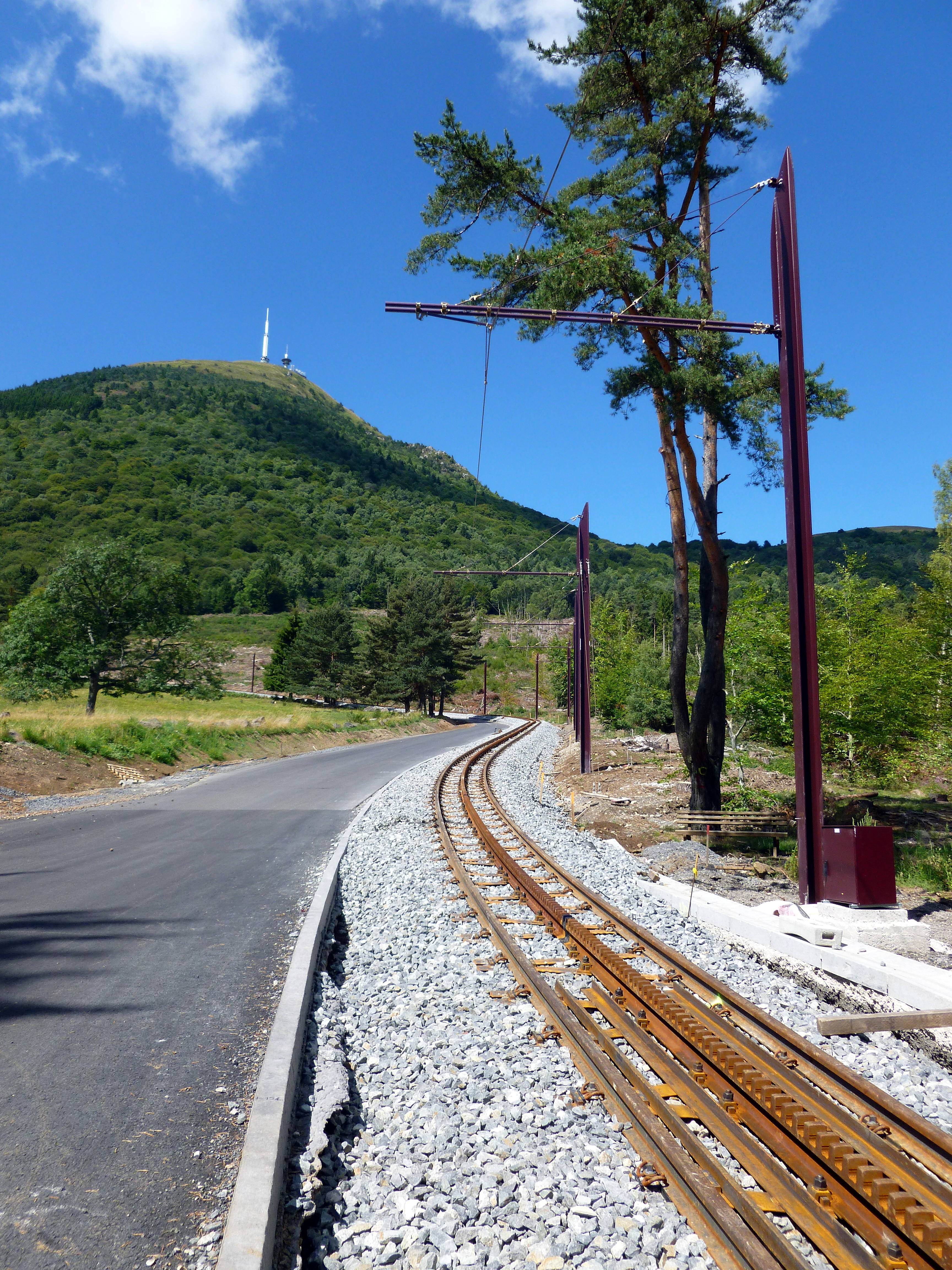 Construction (en cours) du train à crémaillière qui emmènera les touristes au sommet du Puy de Dôme en 2012.